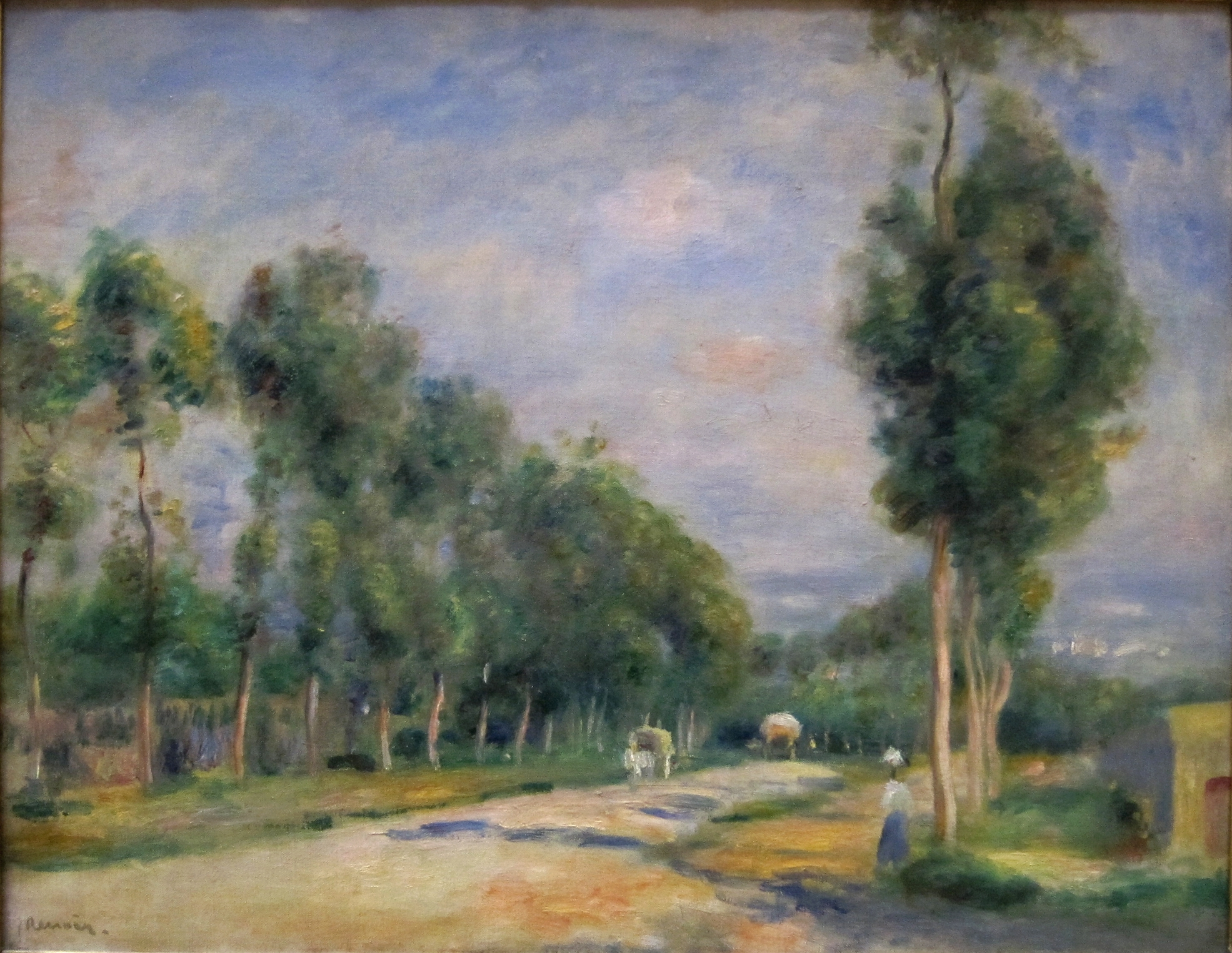 Route de Versailles à Louveciennes, Palais des Beaux-Arts de Lille (Nord).